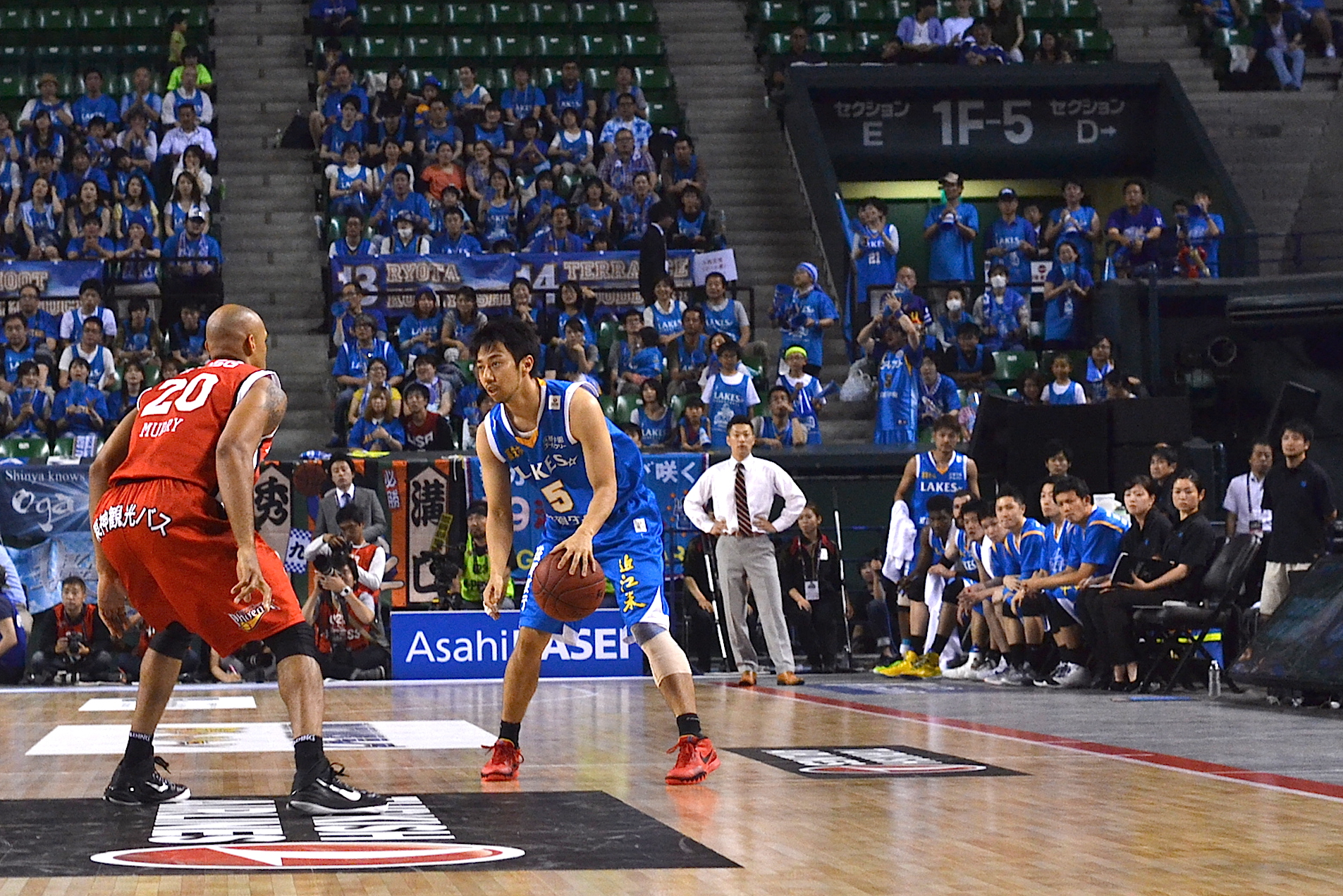 滋賀レイクスターズロゴ